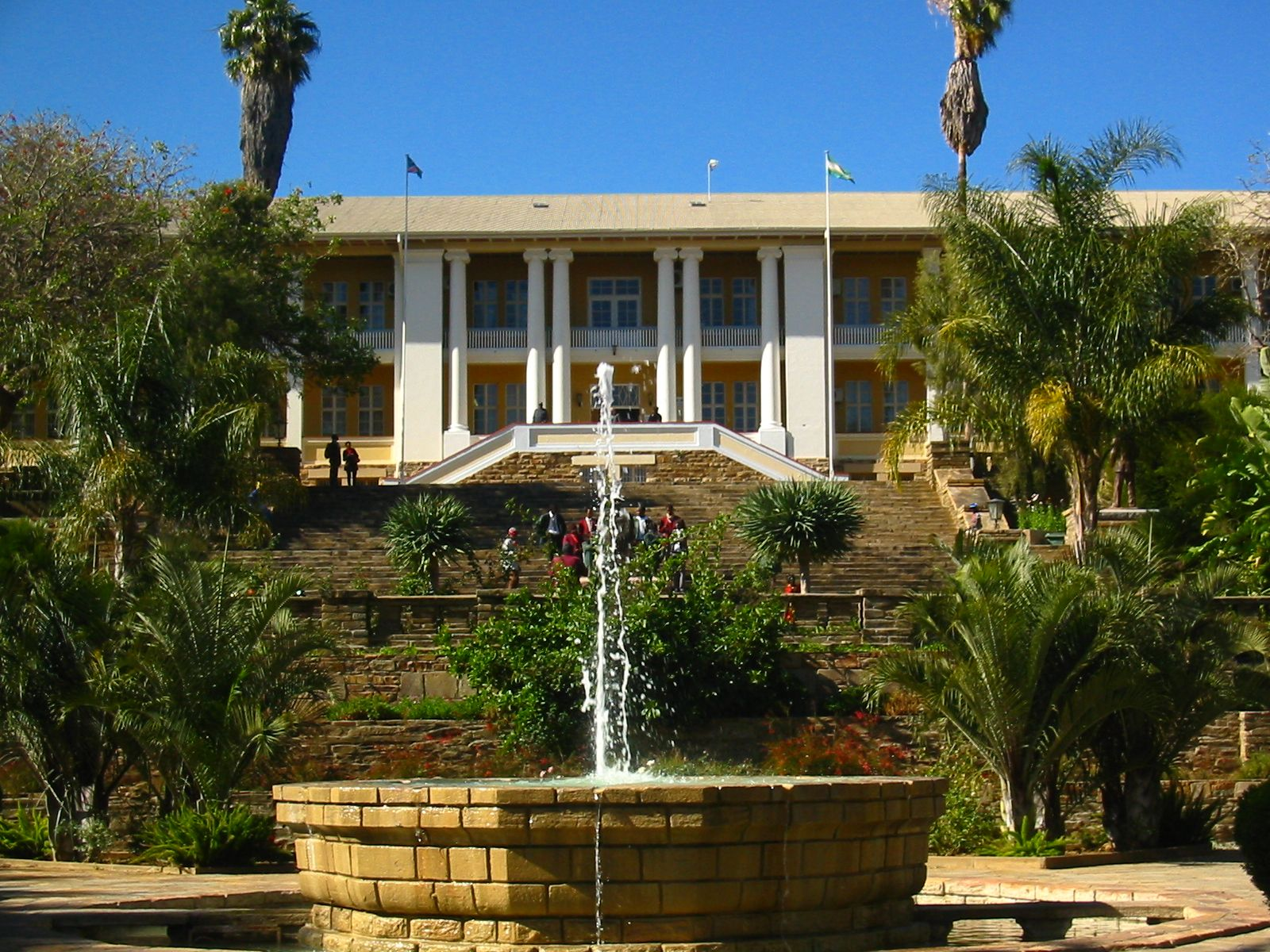 Klein Windhoek, Windhoek, Namibia